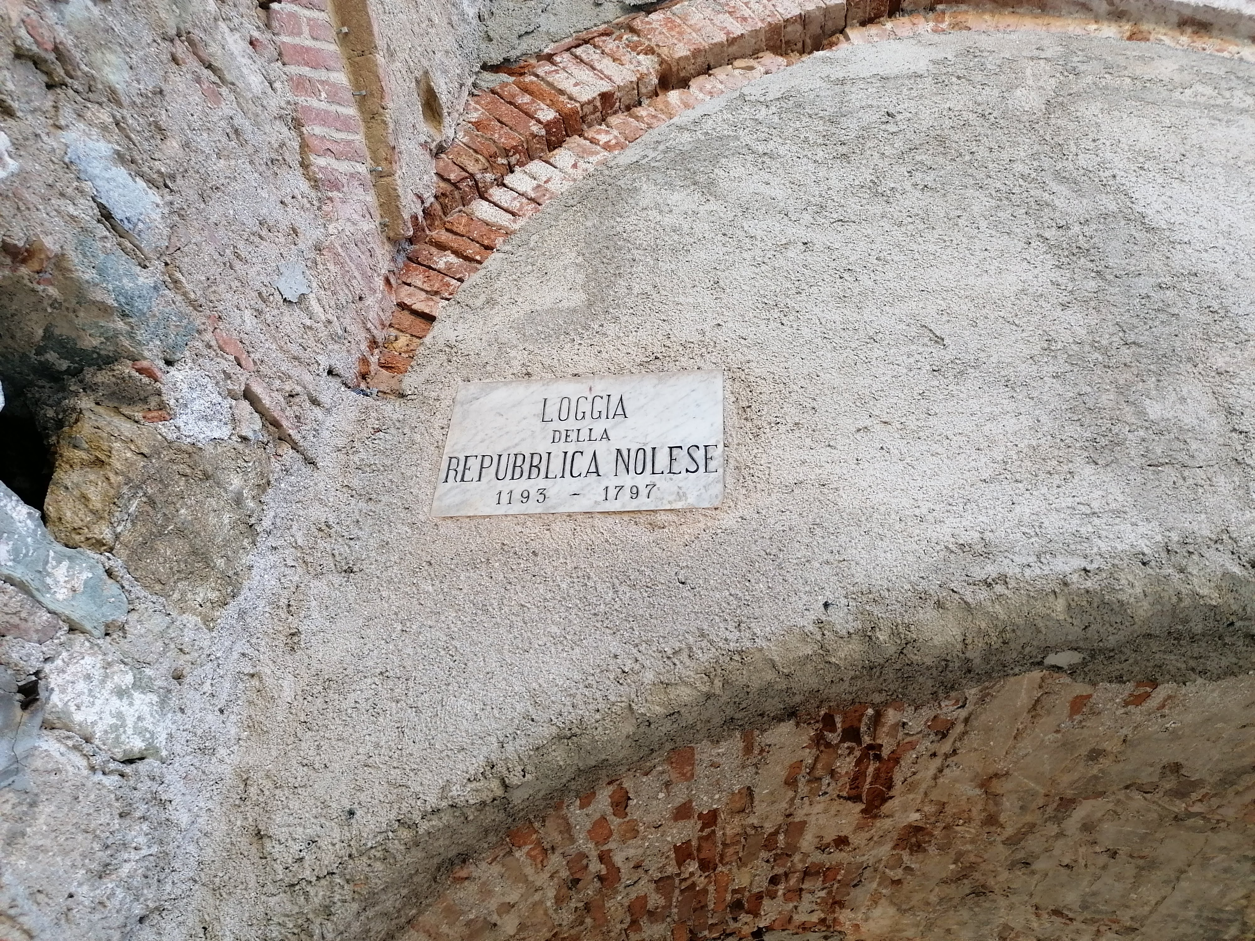 Cartello all'entrata della Loggia della Repubblica Nolese da Piazza Dante Alighieri, recante il nome della via e, sotto, gli anni in cui Noli era repubblica.